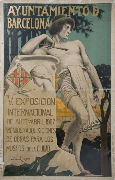 Autor:JOAN LLIMONA, Barcelona, 1860-1926 Títol: V Exposicion Internacional de Arte. Abril 1907